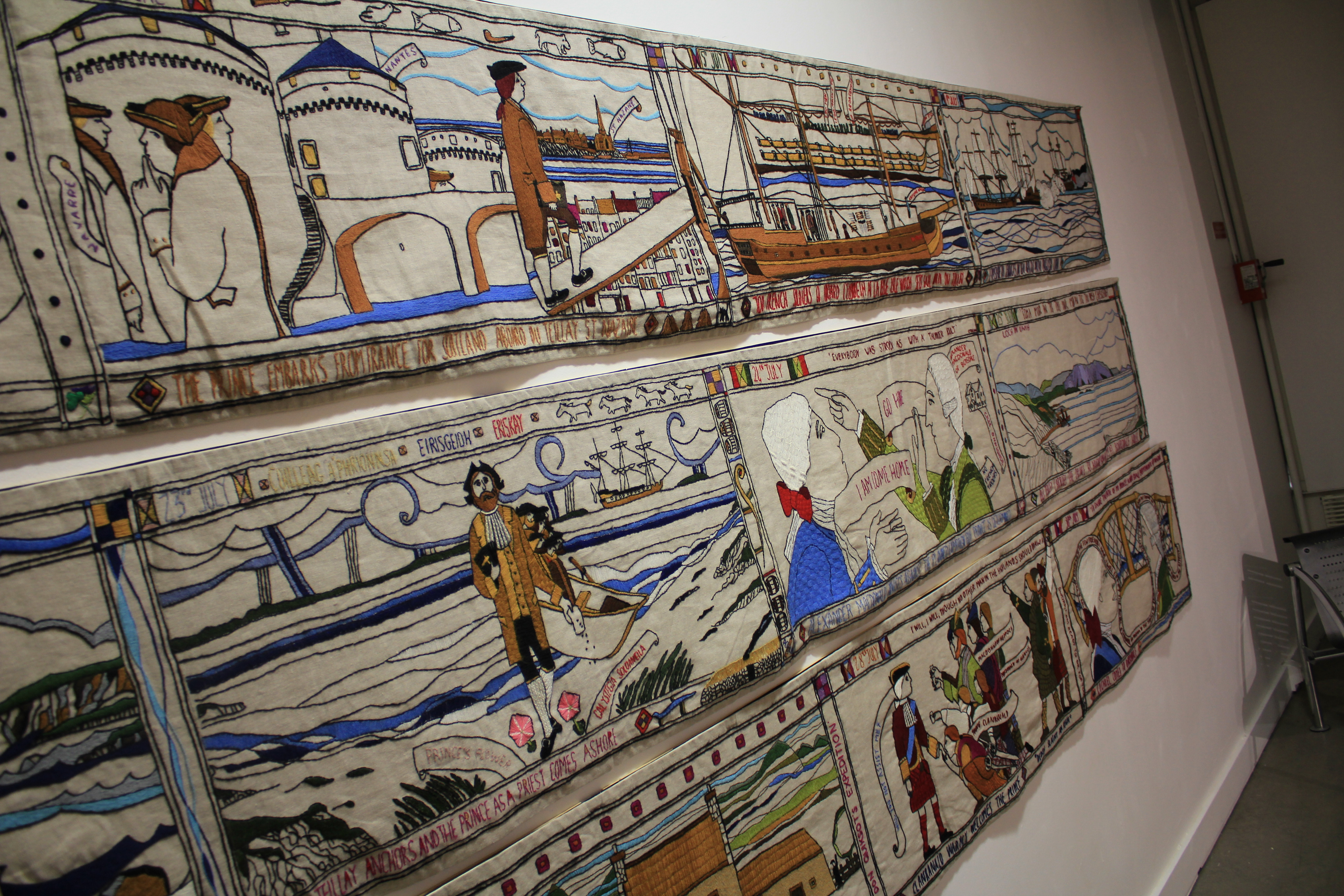 Exposition de la Prestonpans Tapestry lors du festival interceltique de Lorient 2017